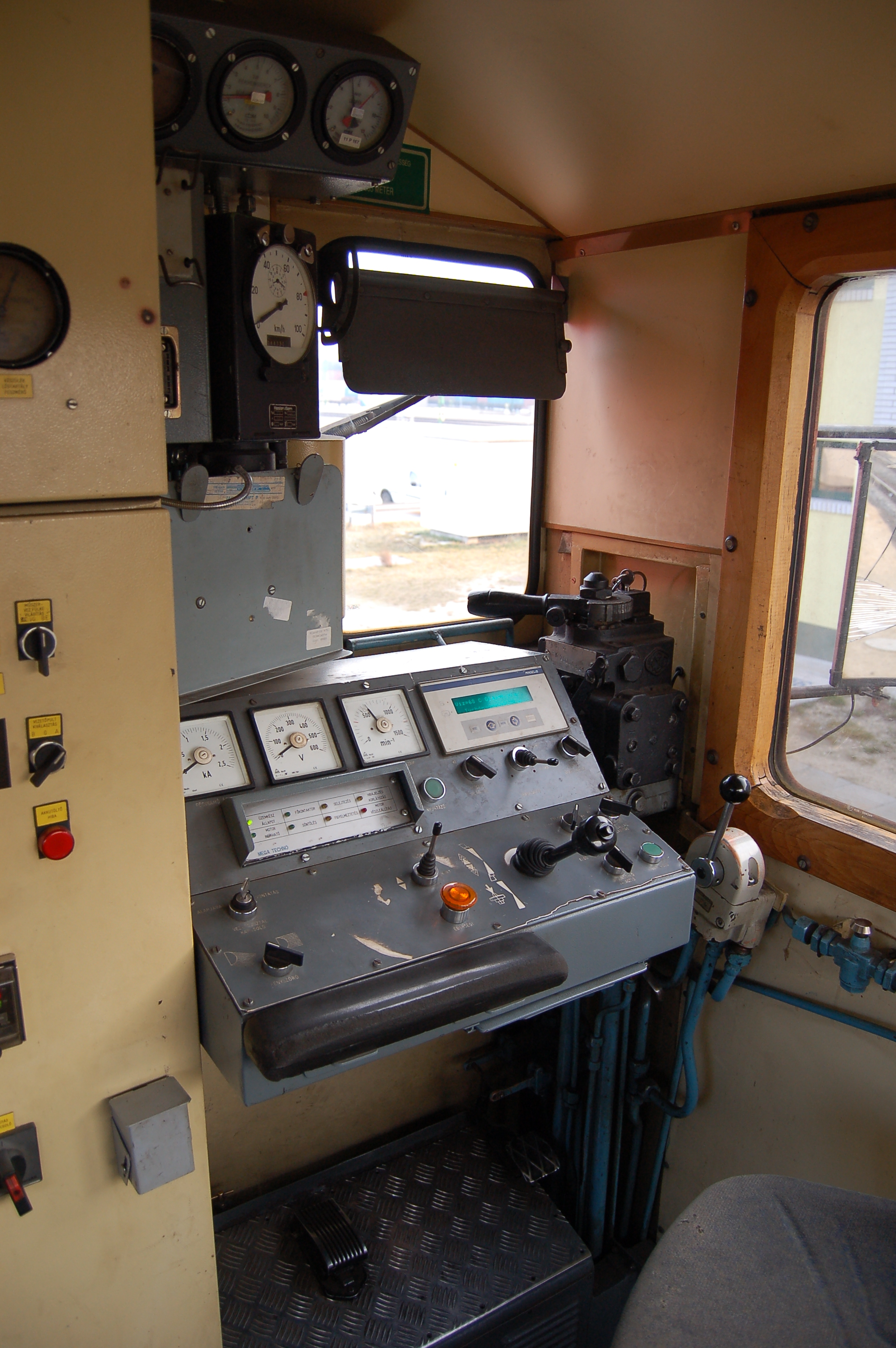 M44 422 pályaszámú dízelmozdony vezetőállása